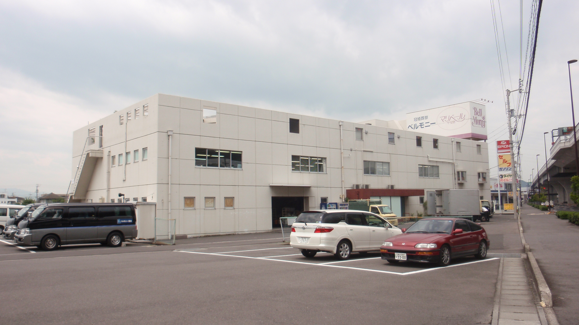 香川県高松市にあるベルモニー本社・